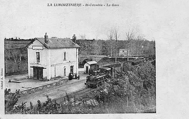 La gare de Lamouzinière - Saint-Colombin sur la ligne à voie étroite de Nantes à Legé.